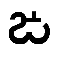 нгакараму